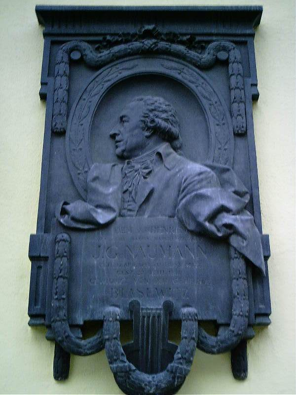 J.G.Naumann memorial